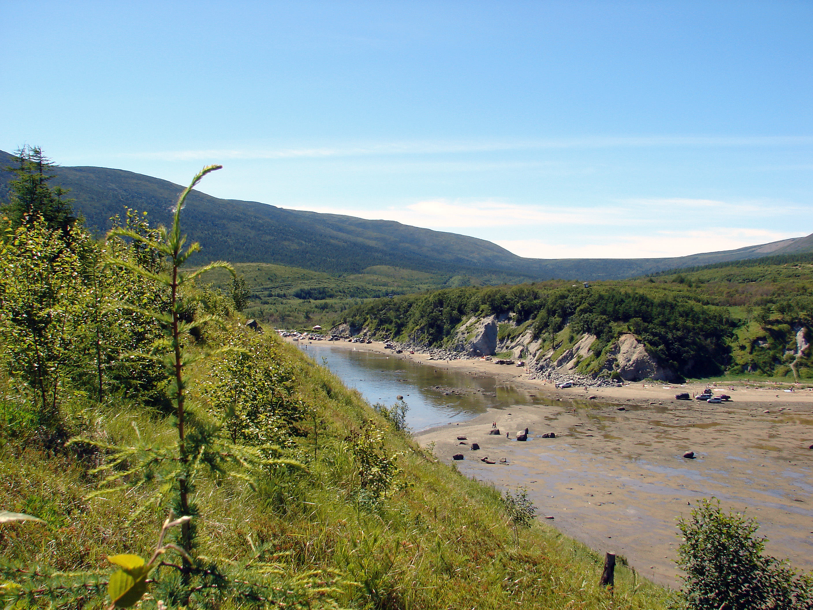 Ручей Веселый: Район устья ручья Веселый водоохранная зона бухты Веселая, Магадан, Магаданская область This image is related to the protected area of Russia number 4920011